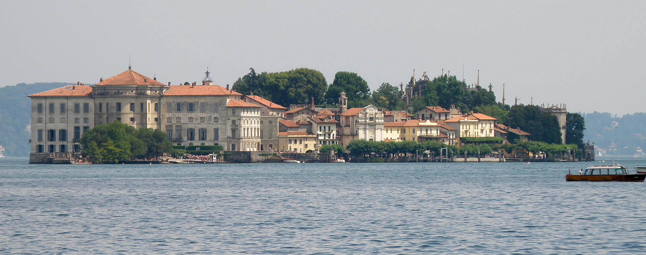 Isola Bella (Stresa, VB), vista dalla riva del Lago Maggiore tra Baveno e Stresa. Guardiamo verso sud-est. A sinistra, Palazzo Borromeo.